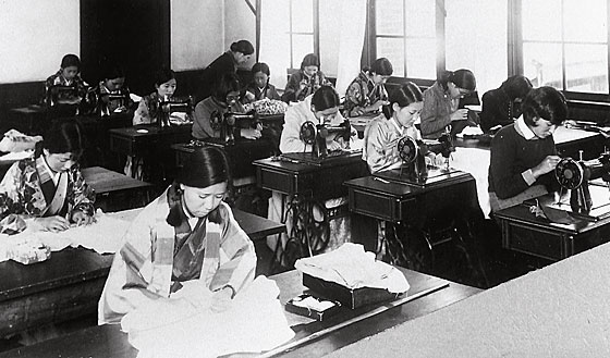 洋裁 星名久教授。和服・洋服・チマチョゴリの生徒もいる（1930年）